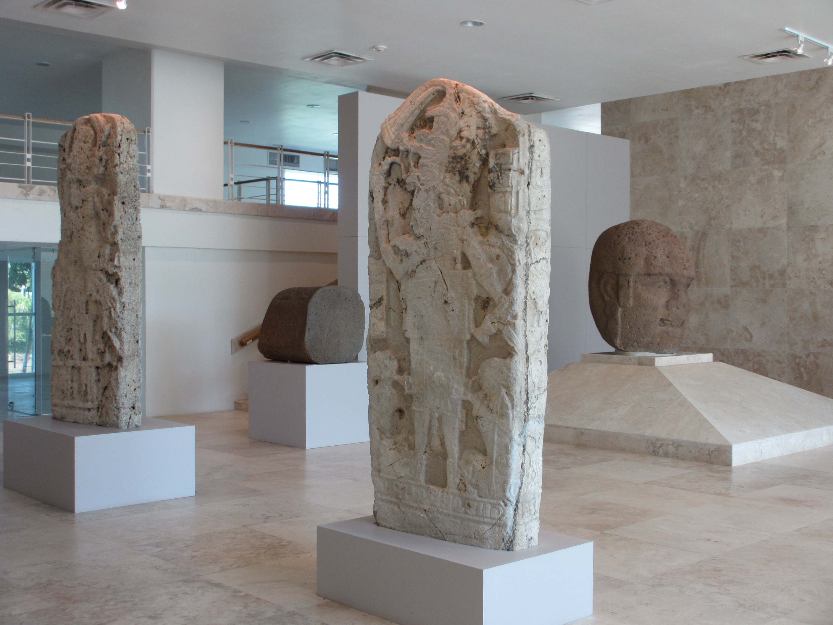 Mezanine del Museo Regional de Antropología Carlos Pellicer Cámara, en la ciudad de Villahermosa, Tabasco, México.